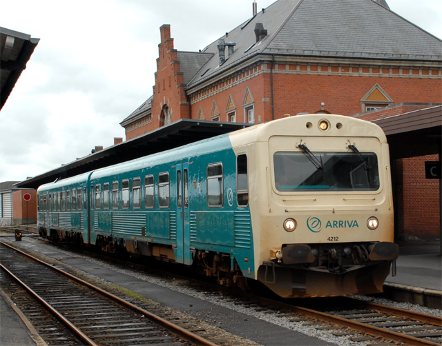 Arriva treinstel 4212 van het type MR/MRD te Esbjerg.